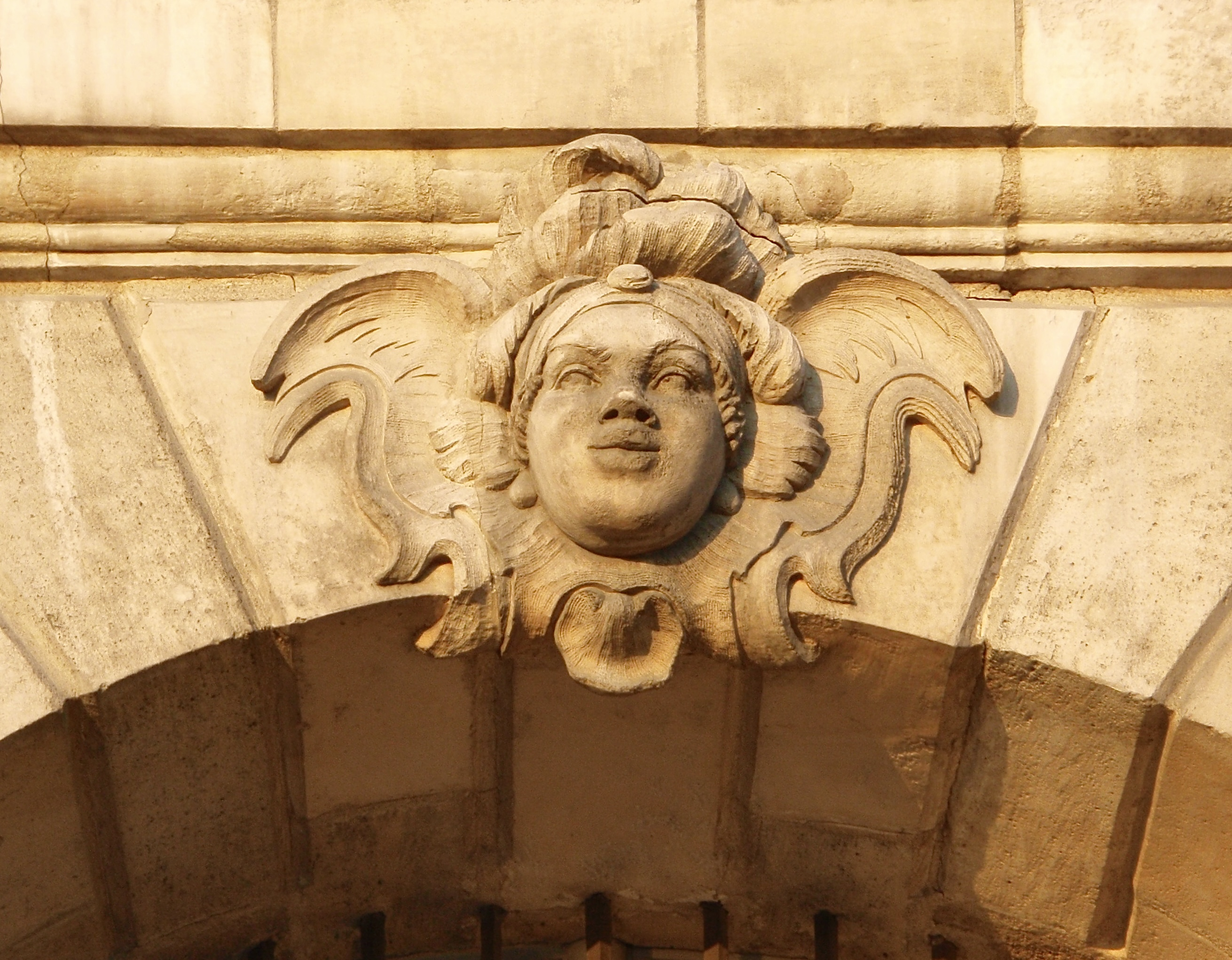 Bordeaux place de la Bourse Mascaron visage d'une africaine